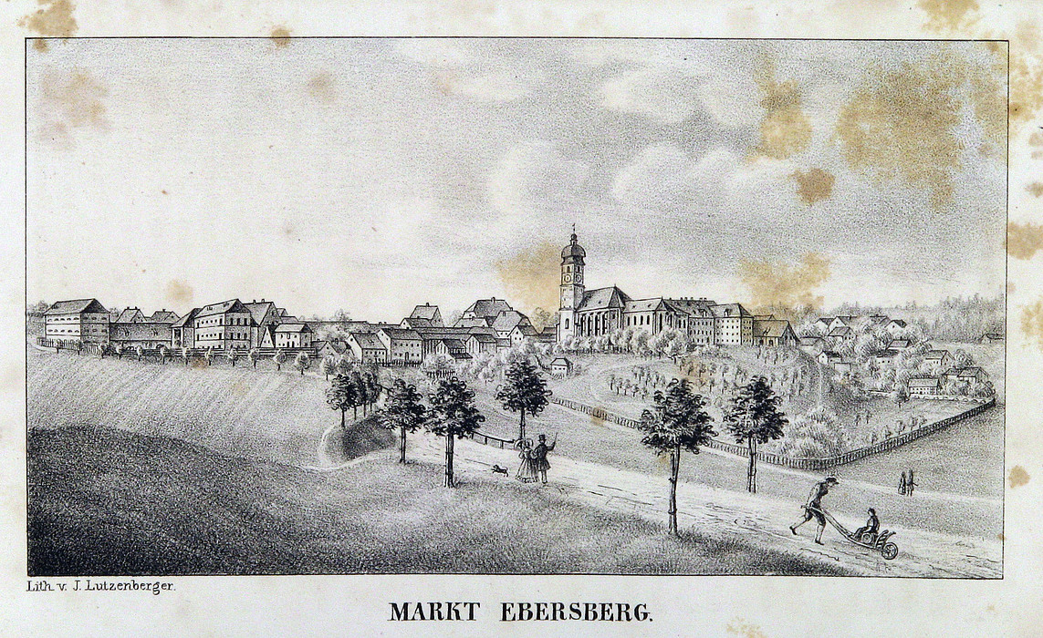 Markt Ebersberg, aus: F. X. Paulhuber: Geschichte von Ebersberg und dessen Umgegend in Oberbayern. Burghausen, Lutzenberger, 1847.